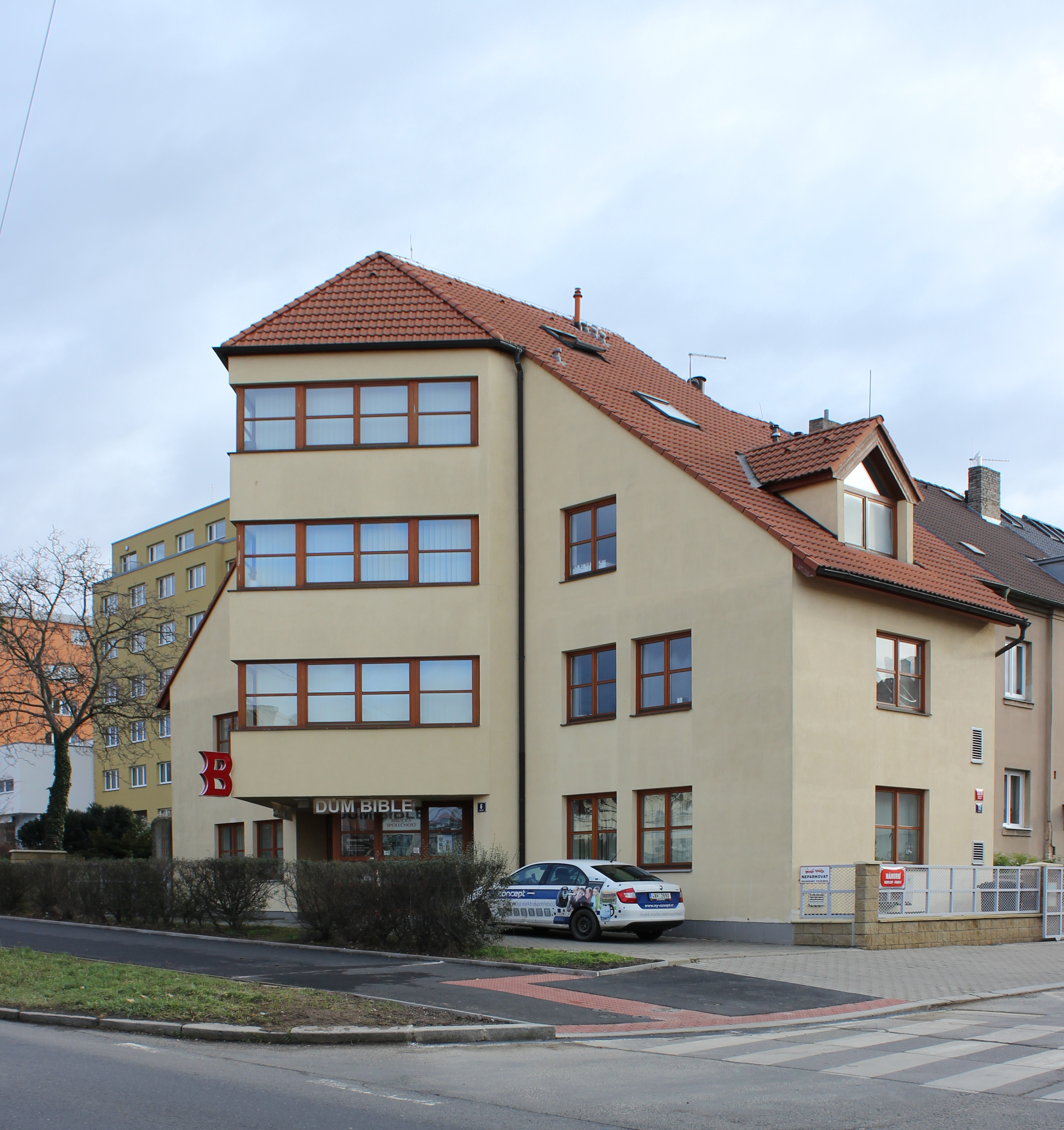 Dům Bible v Náhorní ulici v pražských Kobylisích (pohled od severozápadu), Střelničná 1816/6, Náhorní 1816/12, Dům Bible, Česká biblická společnost.